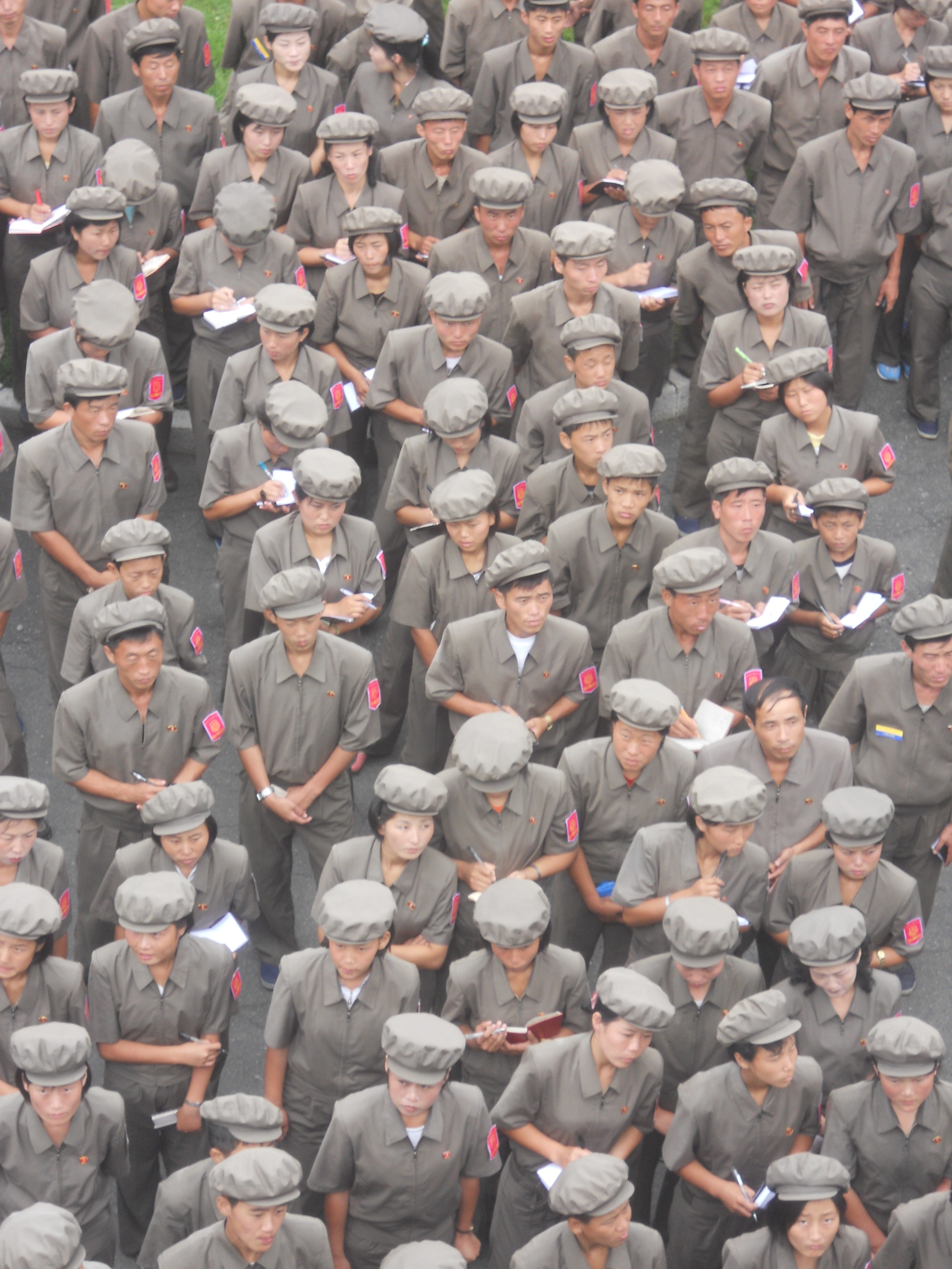 Samjiyon Regional Museum